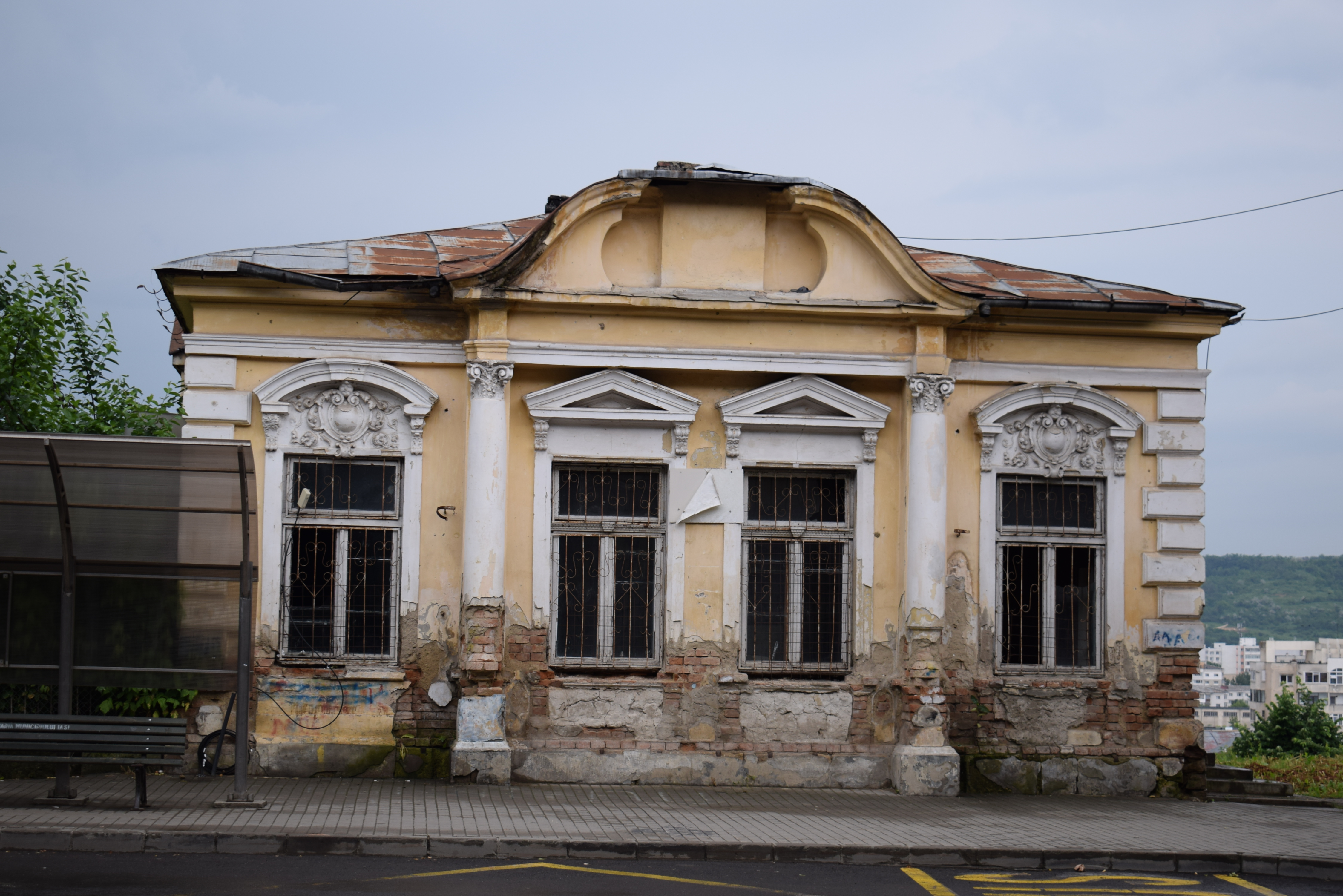 Casa Buicliu, azi Biblioteca județeană „Gh. Asachi”